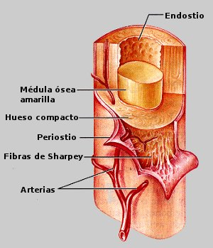 Endostio